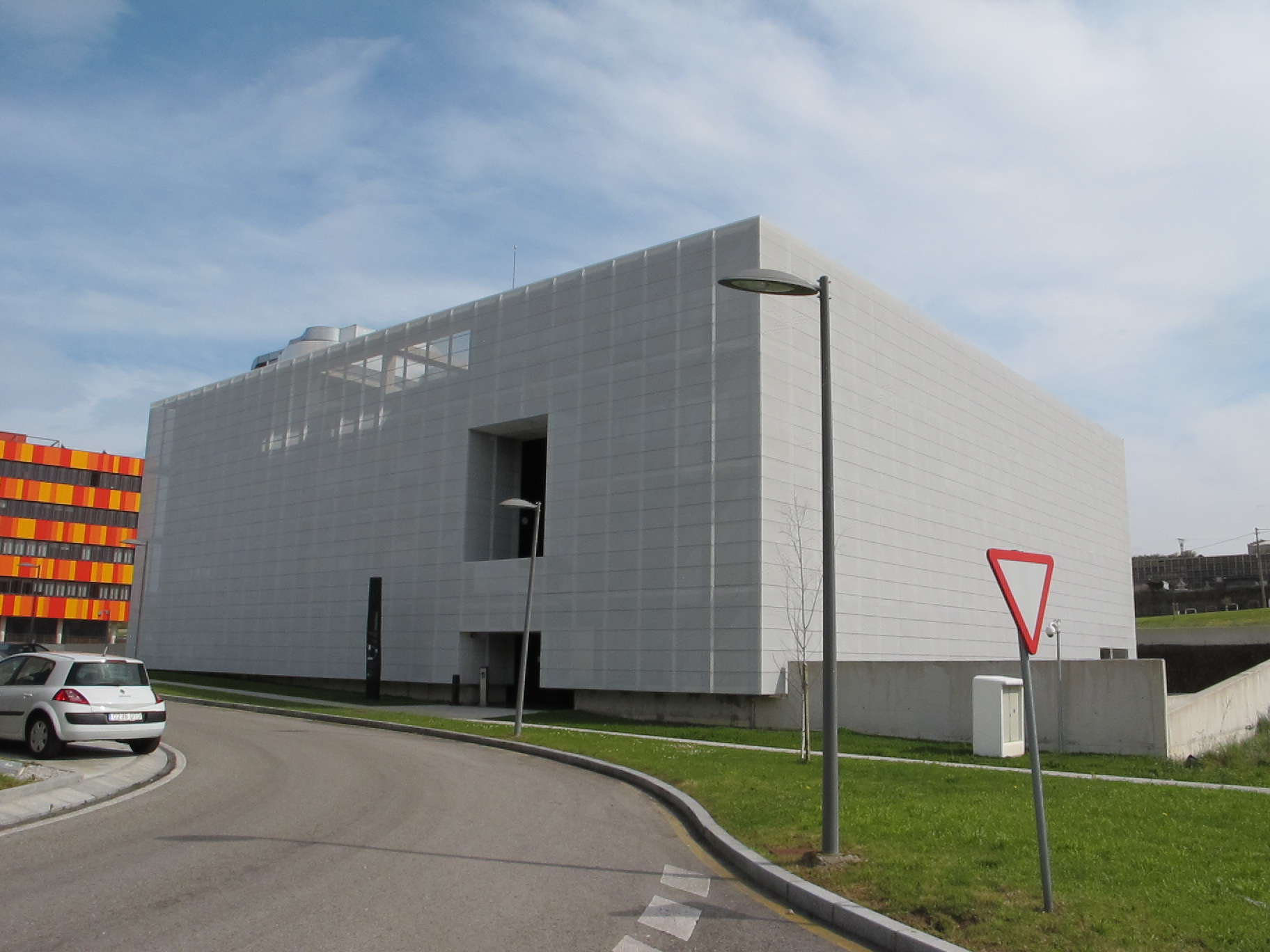 Instalaciones del Instituto de Biomedicina y Biotecnología de Cantabria en el Parque Científico y Tecnológico de Cantabria (PCTCAN), en Santander.